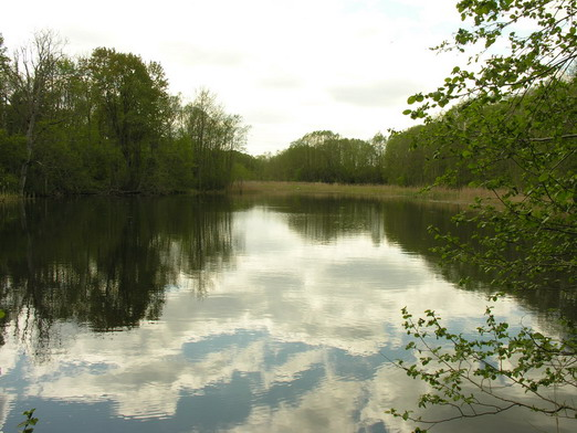 Ritinės dvaro tvenkinys Foto: Algirdas, 2006 m. gegužės 17 d.